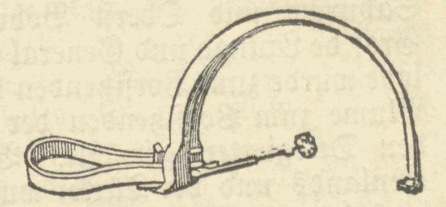 Berliner Eisen in ungespanntem Zustand Selbstscan aus Brockhaus (1908)